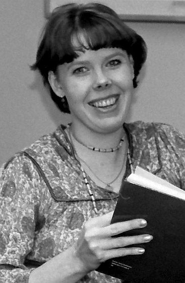 Anne Hänninen Kuusankosken työväenopiston kirjallisuuspiirin vieraana 25.11.1982